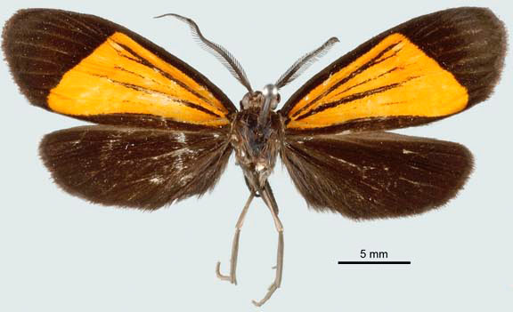 Notascea brevispinula